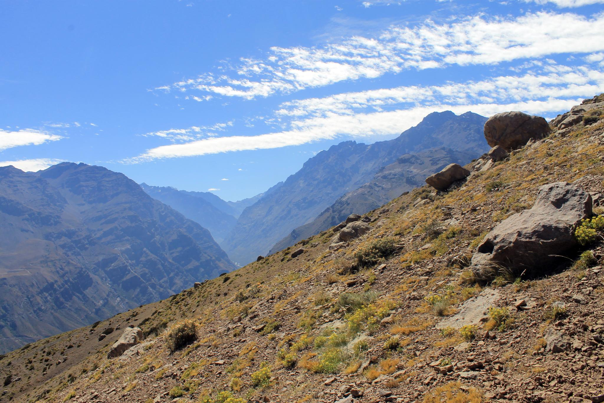 vista rio Colorado